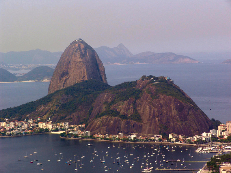 Blick auf den Zuckerhut und Morro da Urca